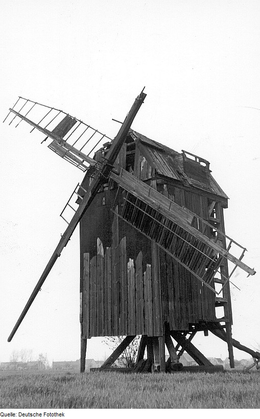 Original image description from the Deutsche Fotothek Jessen (Elster)-Gentha. Bockmühle